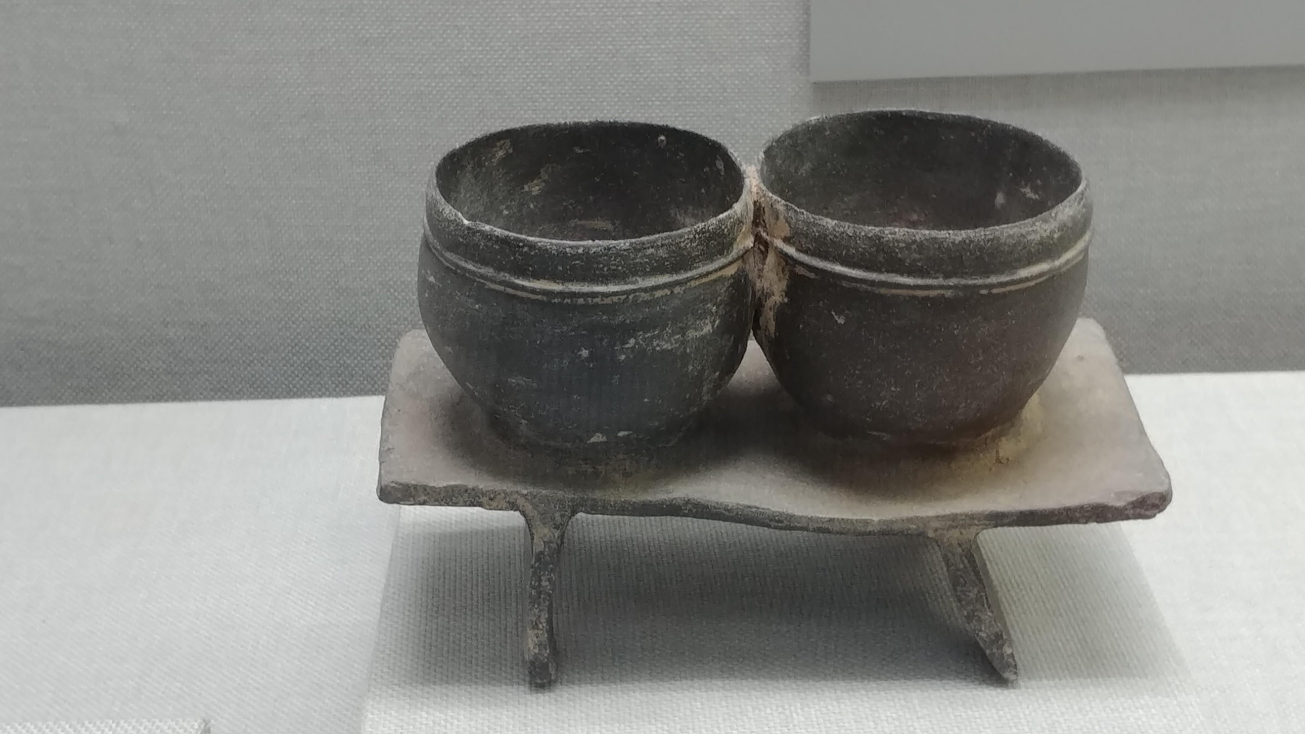 부뚜막위에 토기 2개가 솥처럼 올려져 있는 이형토기이다. 다리는 2개가 달려 있고 토기 목부분에는 두 줄의 돋을대가 둘러져 있다.